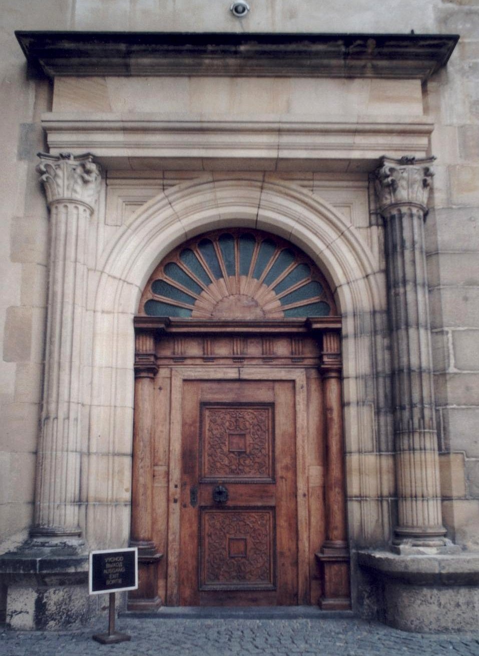 Benedikt Rejt: Portál Jezdeckých schodů Starého královského paláce na Pražském hradě